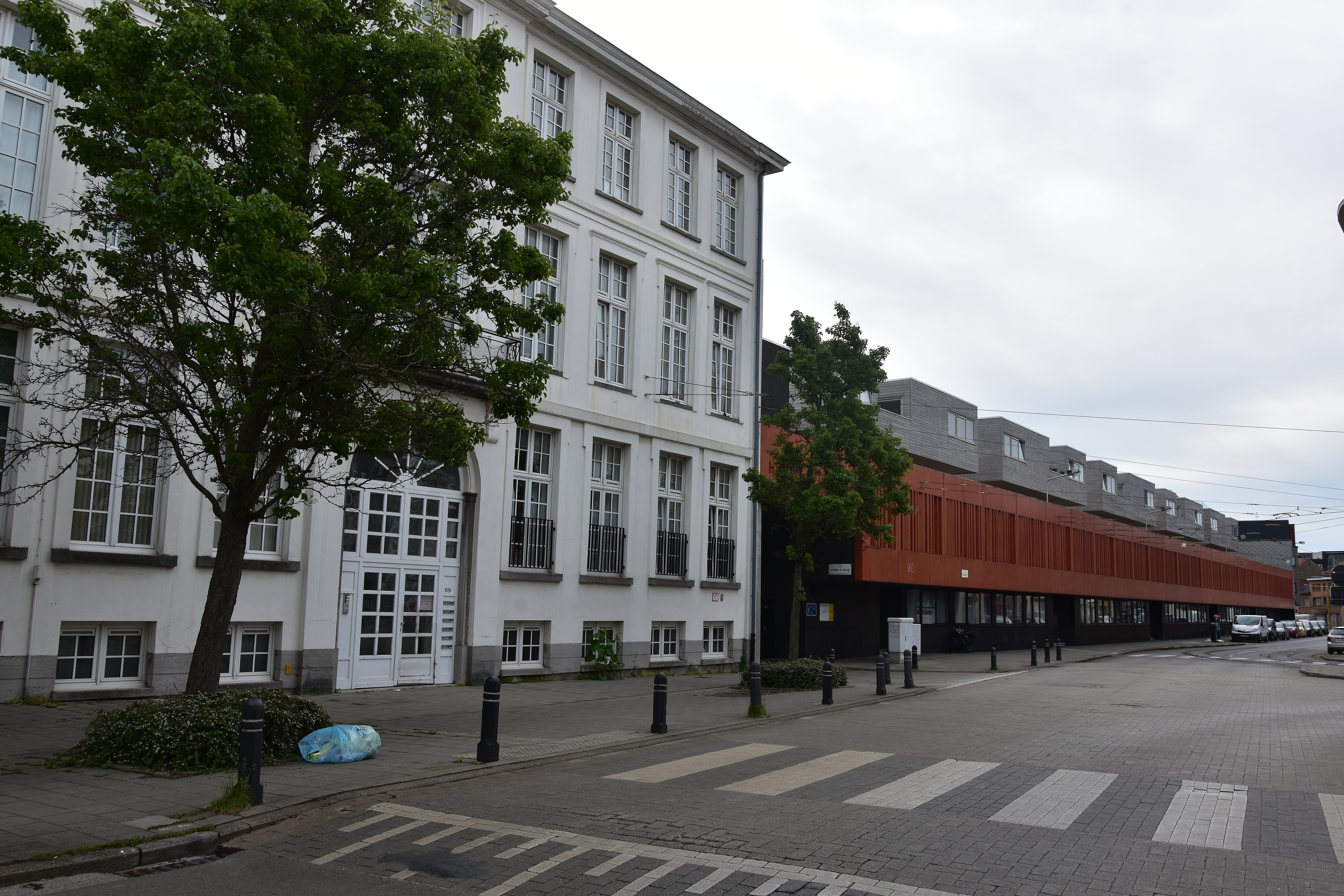 Kazerne de Hollain met breedhuis - Gent 3-05-2020 8-58-15